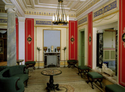 Гостиная. Царицын павильон